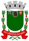 brasão do município de são sebastião da grama